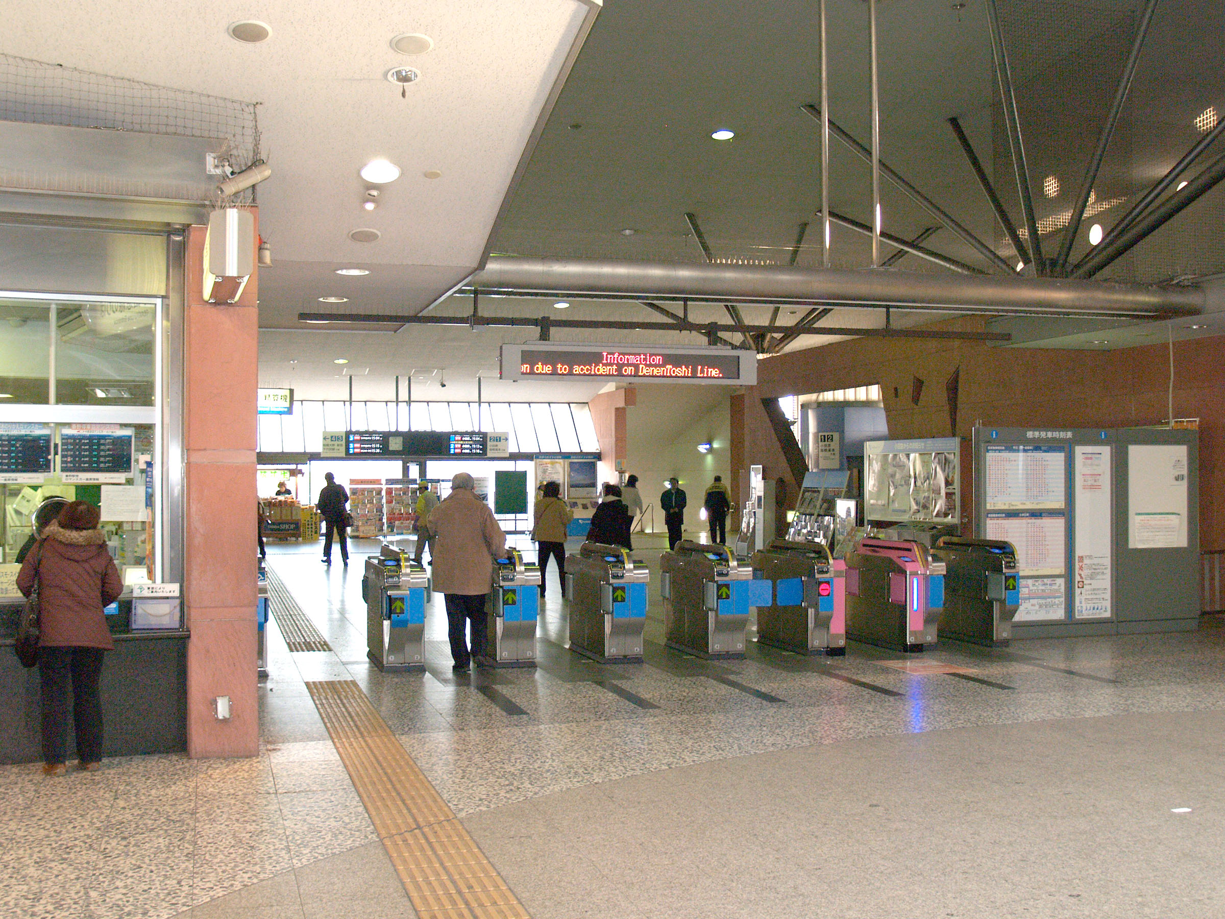 秦野駅改札口